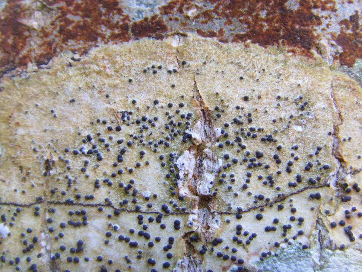 Pyrenula chlorospila, le pont Neuf, Pont Callec, Morbihan, Bretagne, France